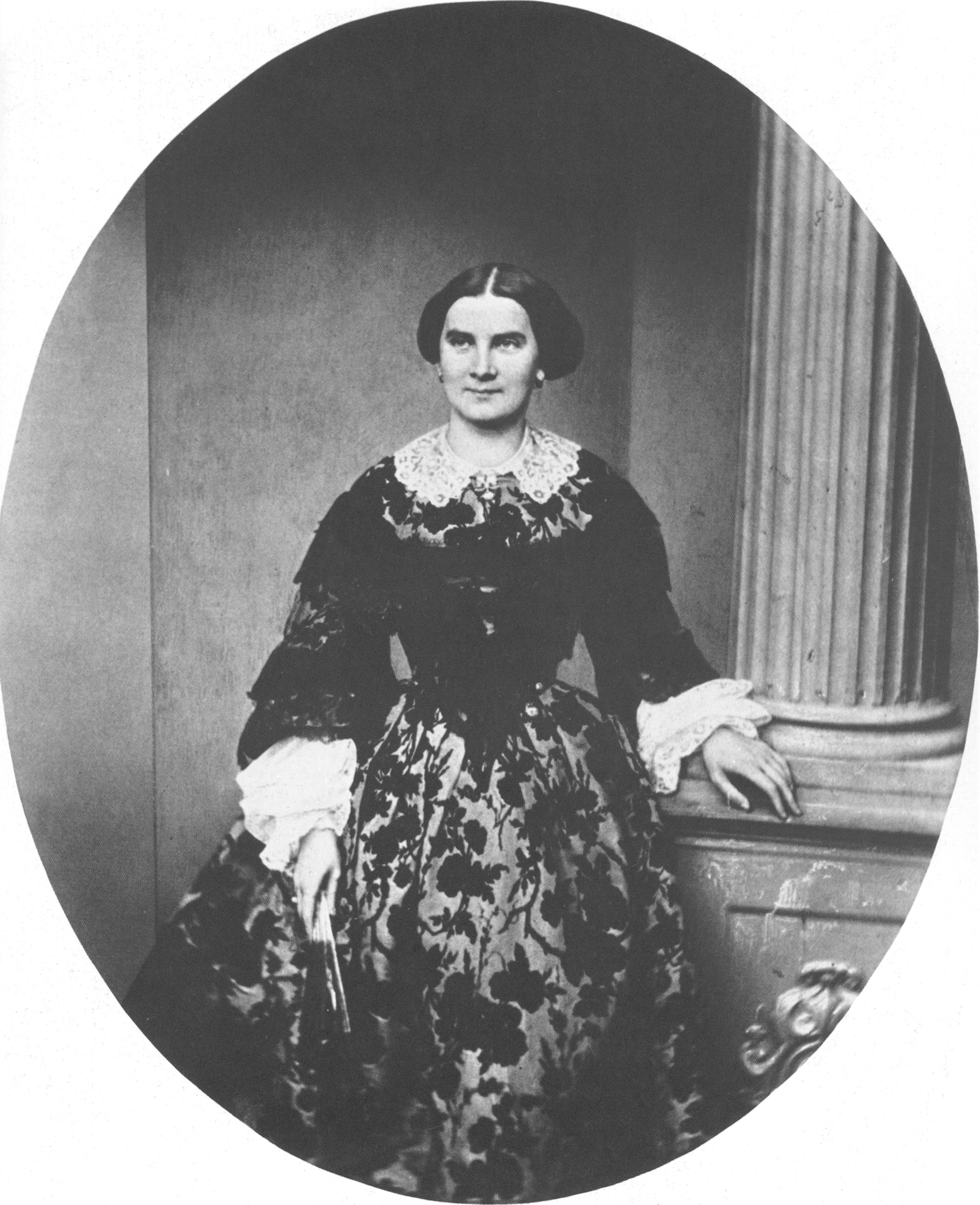 Marie, Königin von Bayern (1825-1889)